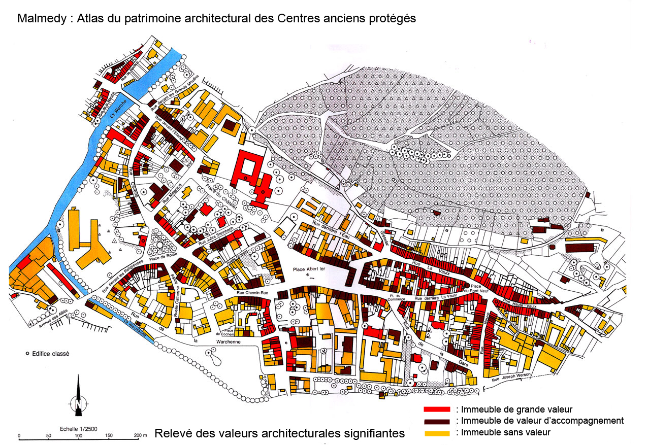 Atlas du patrimoine architectural de Malmedy. La plupart des maisons de grande valeur architecturales sont en pans-de-bois et terre crue (torchis). On les trouve surtout dans les rues Neuve, La Vaulx, Derrière La Vaulx, Haute Vaulx, de la Tannerie, Cavens, place de Rome, ainsi que dans le quartier d'Outrelepont. Les poutres (le plus souvent en bois de chêne) de ces maions constituent aussi des puits de carbone. Elles ont donc à la fois une valeur patrimoniale et une valeur écologique.